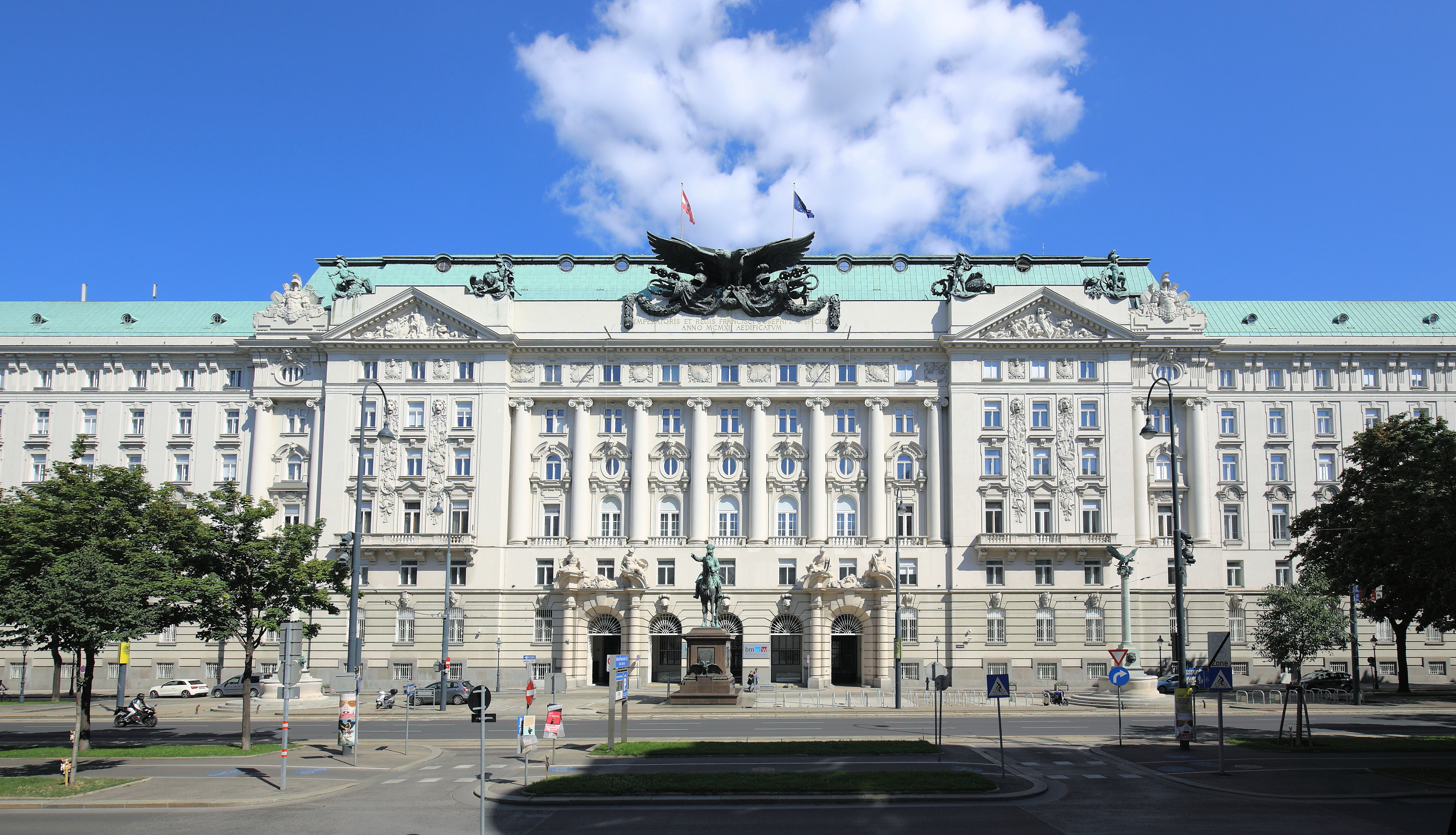 Das Regierungsgebäude und ehemalige k.u.k. Kriegsministerium am Stubenring 1 in der österreichischen Bundeshauptstadt Wien. Das Gebäude wurde in den Jahren 1909 bis 1913 von Ludwig Baumann errichtet. Bis zum Ende der Monarchie wurde das Gebäude vom k.u.k Kriegsministerium genutzt. Heute (2014) ist es der Sitz der Bundesministerien für Wissenschaft, Forschung und Wirtschaft sowie für Arbeit, Soziales und Konsumentenschutz. Das Radetzky-Denkmal, ein Werk von Kaspar von Zumbusch und George Niemann (Sockel), stand ursprünglich auf dem Platz Am Hof und wurde am 24. April 1892 enthüllt. Nach dem Bau des Kriegsministeriums wurde es 1912 an dem heutigen Platz aufgestellt. Links und rechts des Radetzkydenkmals befinden sich zwei gleich gestaltete Brunnen mit hohen korinthischen Säulen und Doppeladler als Bekrönung. Der Entwurf dazu stammt vermutlich von Ludwig Baumann. Aufgestellt wurden sie im Zuge der Errichtung des Kriegsministeriums 1912.